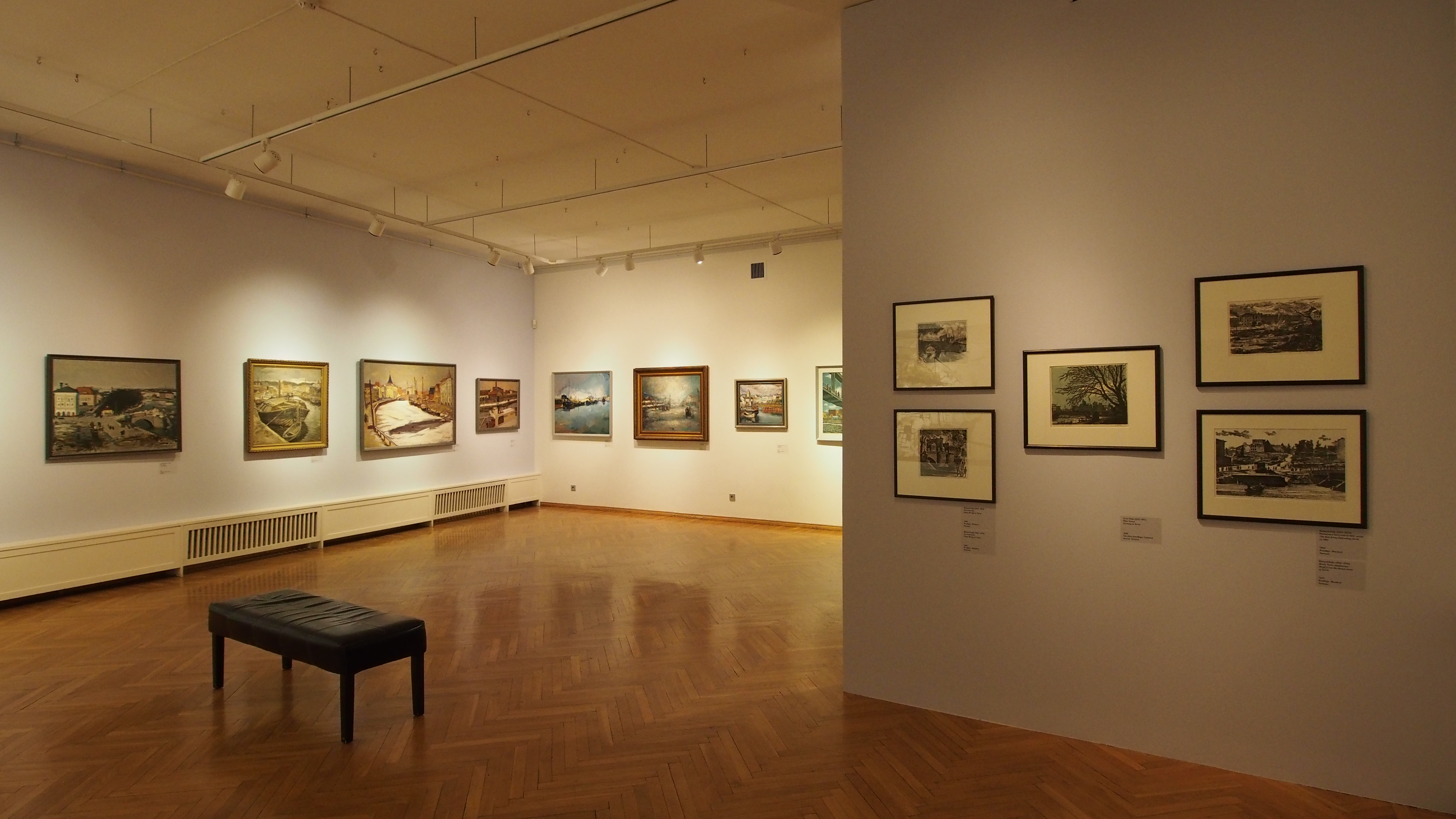 Vaade näituselt "Muutuv Tartu neljas vaates" Tartu Kunstimuuseumis 2016. aastal. Näitus oli üleval 11. novembrist 2016 kuni 12. märtsini 2017. Selle kuraator oli Merli-Triin Eiskop.